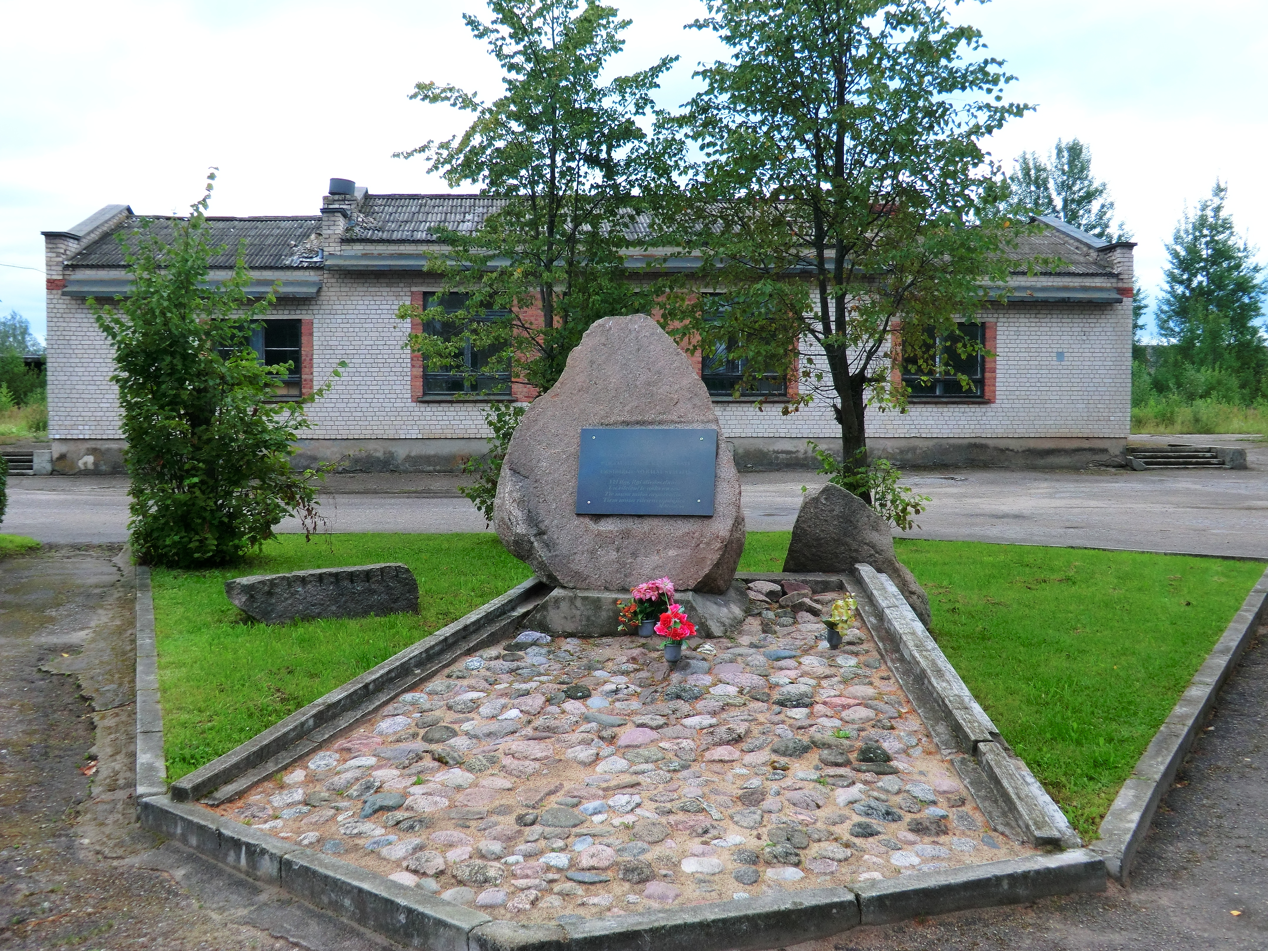 Памятный камень напротив здания вокзаа ст. Балви